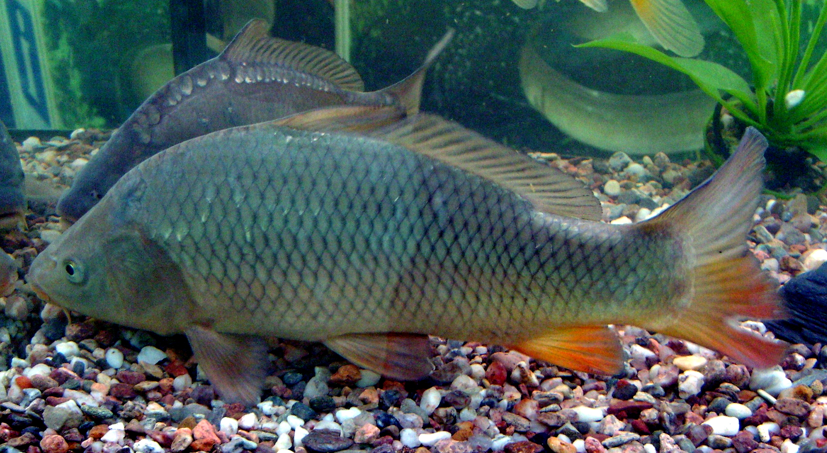 Kapr obecný v akváriu na veletrhu Petrův zdar.